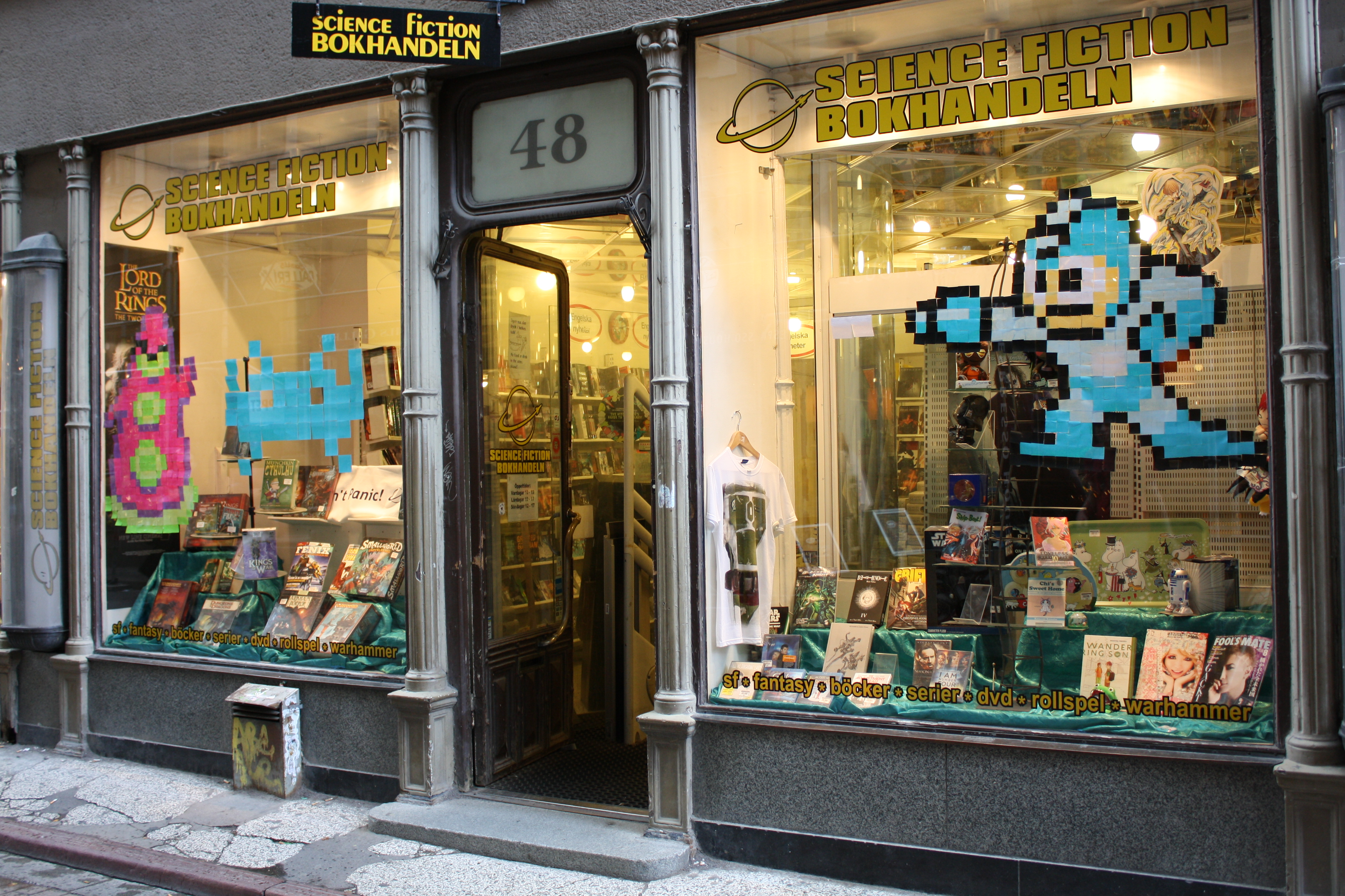 Science Fiction Bokhandelns skyltfönster, Västerlånggatan 48, Stockholm